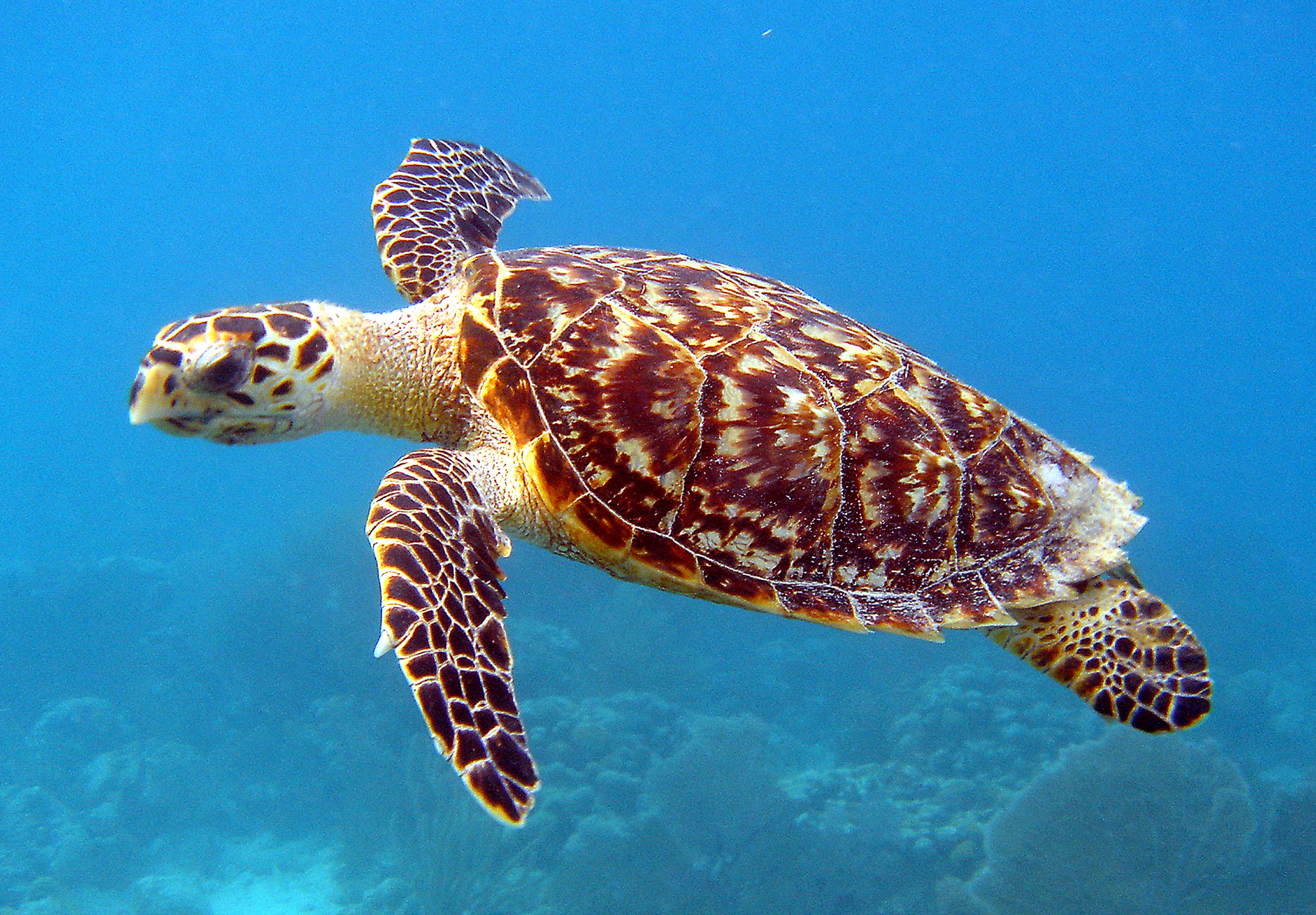 Scientific name: Eritmochelys imbricata.